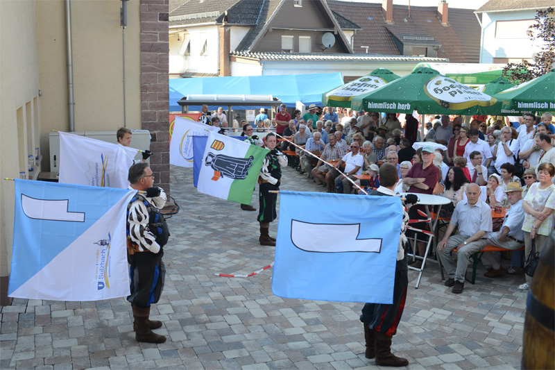 Straßenfest in Sulzbach (Malsch) anläßlich der 900-Jahr-Feier